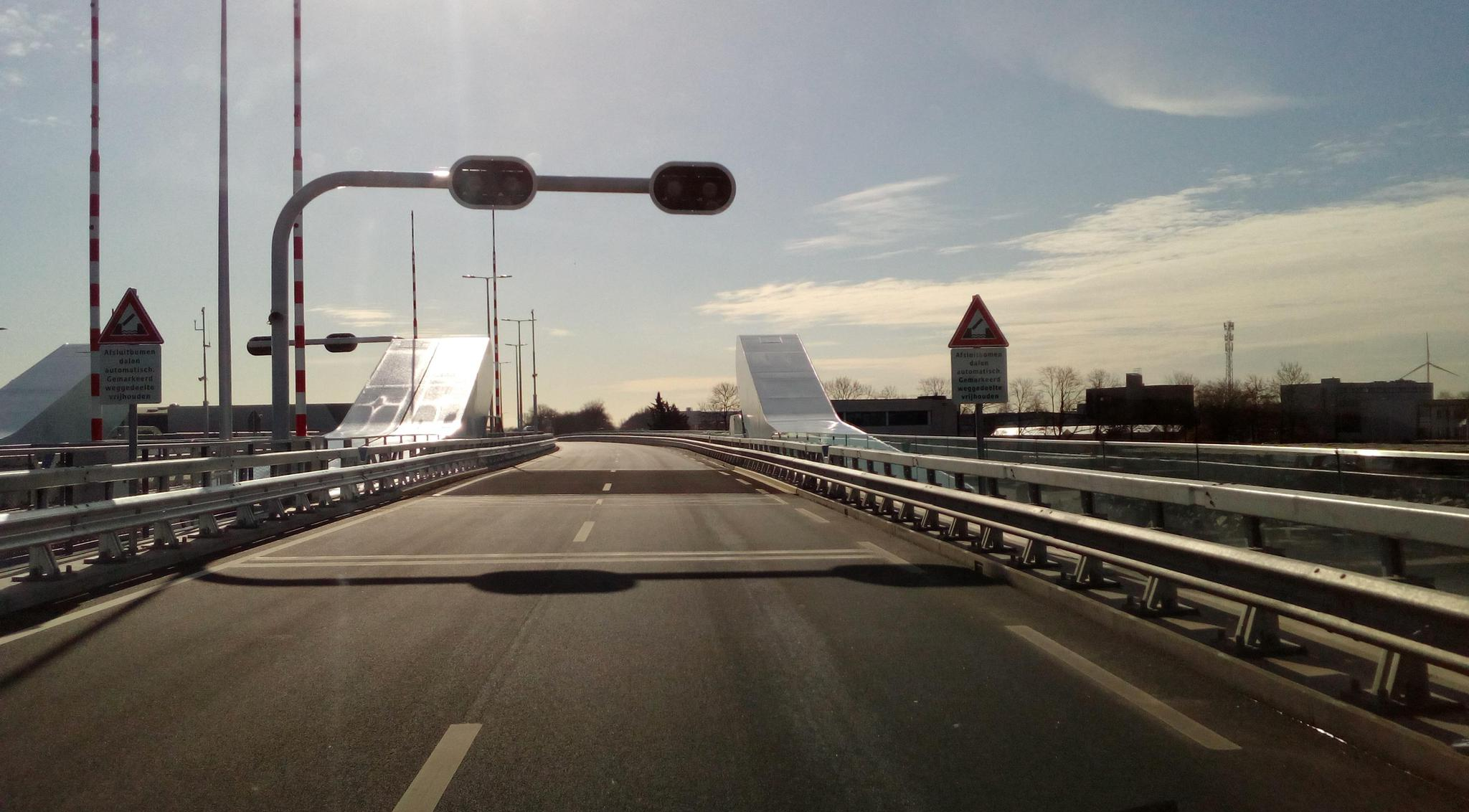 Koningin Maximabrug